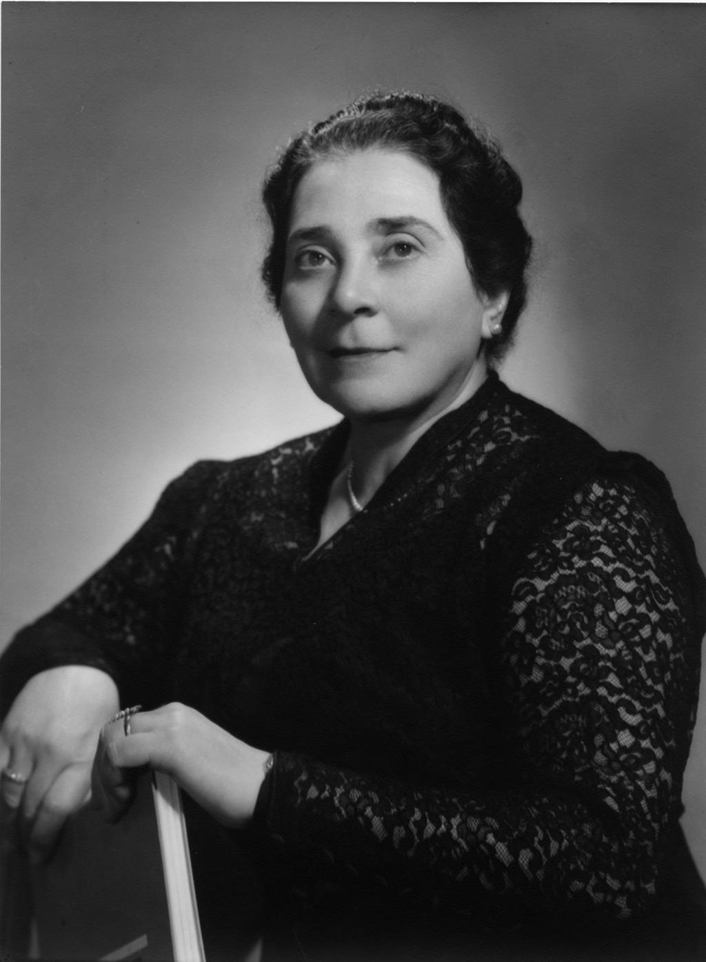 Juana Rosa Aguirre Luco, señora de Pedro Aguirre Cerda.